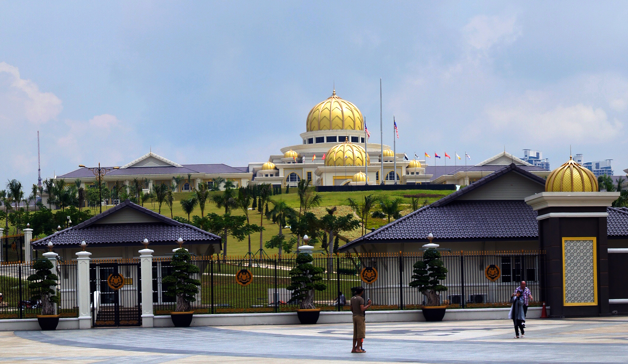 Istana Negara dari pandangan sisi